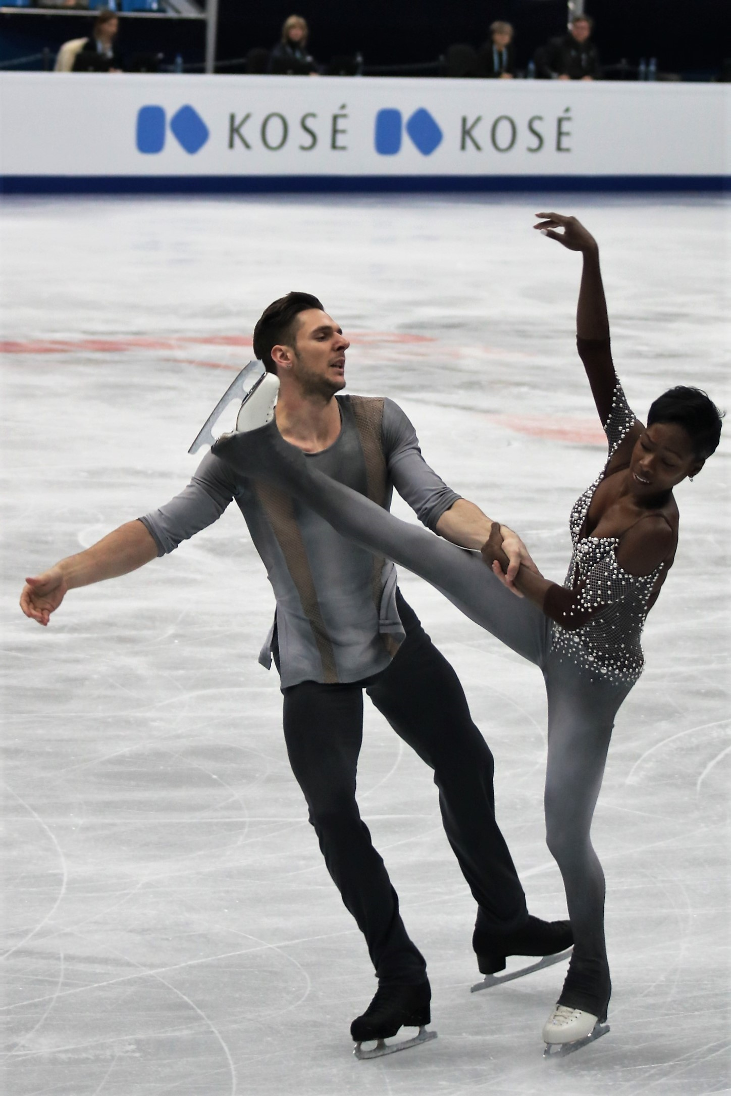 Ванесса Джеймс / Морган Сипре (Франция) на Чемпионате Европы по фигурному катанию 2018.